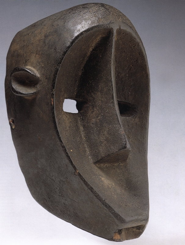 MASCHERA SULAW - Maschera zoomorfa (scimmia) basata sulla scomposizione analitica dei tratti figurativi in volumi geometrici elementari. La superficie concava del muso, con le linee curve del profilo e del naso che spingono verso la bocca aperta, conferiscono alla maschera un certo dinamismo espressivo. Bocca e occhi rettangolari e forati, orecchie ellissoidali. La società kore costituisce secondo D. Zahan (1960) l'ottavo e ultimo livello delle società d'iniziazione bamana (Bambara). Studi più recenti (Colleyn 1998) ritengono però che non si tratti dell'ultimo stadio di un percorso iniziatico, ma di un rito di passaggio obbligatorio, che ha luogo ogni sette anni, rivolto a tutti i giovani di sesso maschile. Attraverso una serie di prove che affrontano nella boscaglia, i giovani muoiono simbolicamente per rinascere come uomini. Le maschere della società kore lasciano il bosco sacro alla fine della stagione secca e si esibiscono pubblicamente per propiziare le piogge necessarie all'agricoltura. Alle diverse classi di età in cui è suddivisa la società kore corrispondono diverse maschere zoomorfe: iene, leoni, scimmie. La maschera scimmia (sulaw) è accompagnata da musicisti e uomini muniti di fruste e torce; si muove mimando il comportamento dell'animale, talvolta arrampicandosi sugli alberi. La scimmia simboleggia un certo livello del sapere, che va oltrepassato per la saggezza rappresentata dal leone.